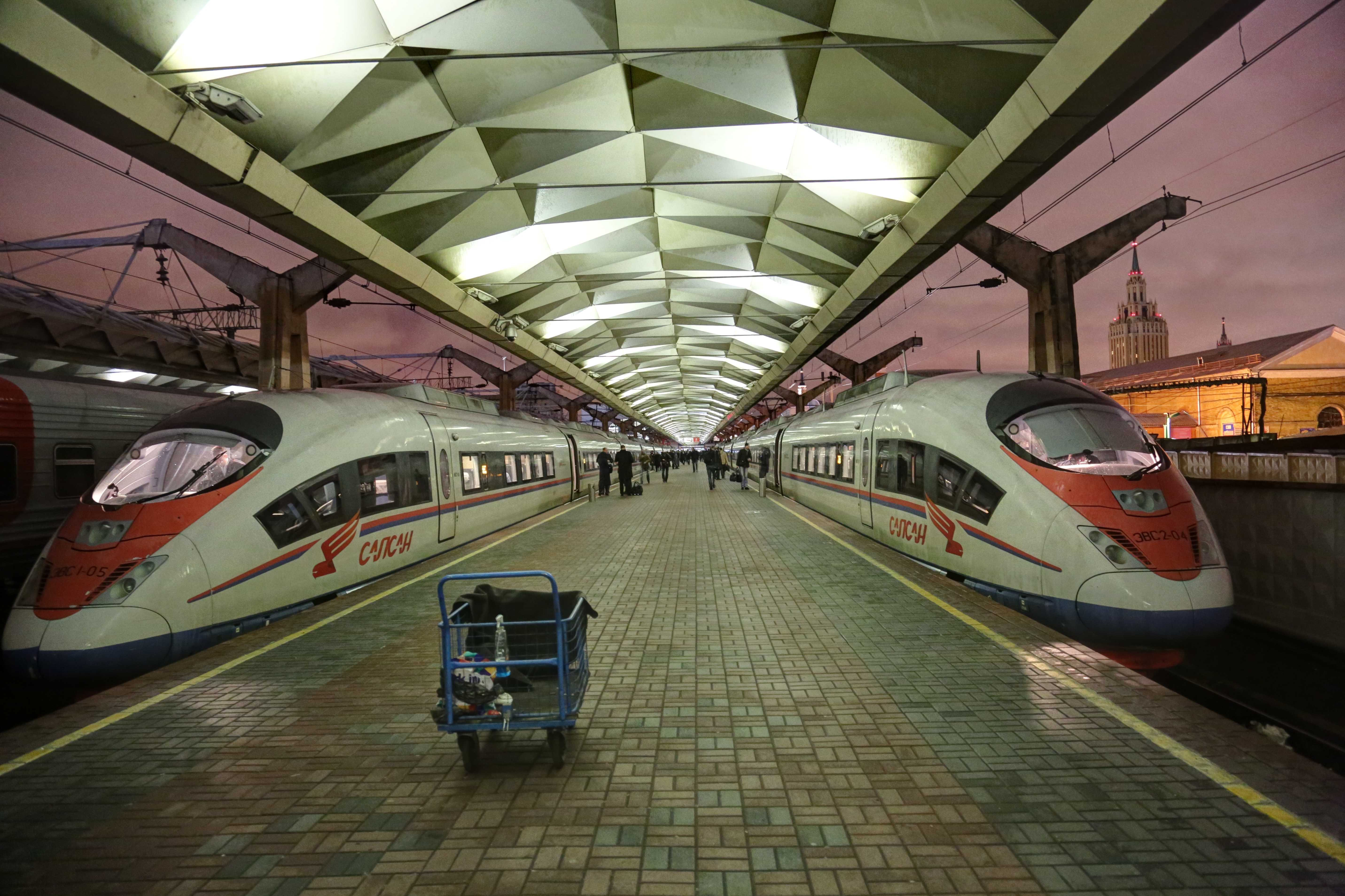 Express(Moscow-St.PeterBurg) // Сапсан на Ленинградском вокзале Москвы